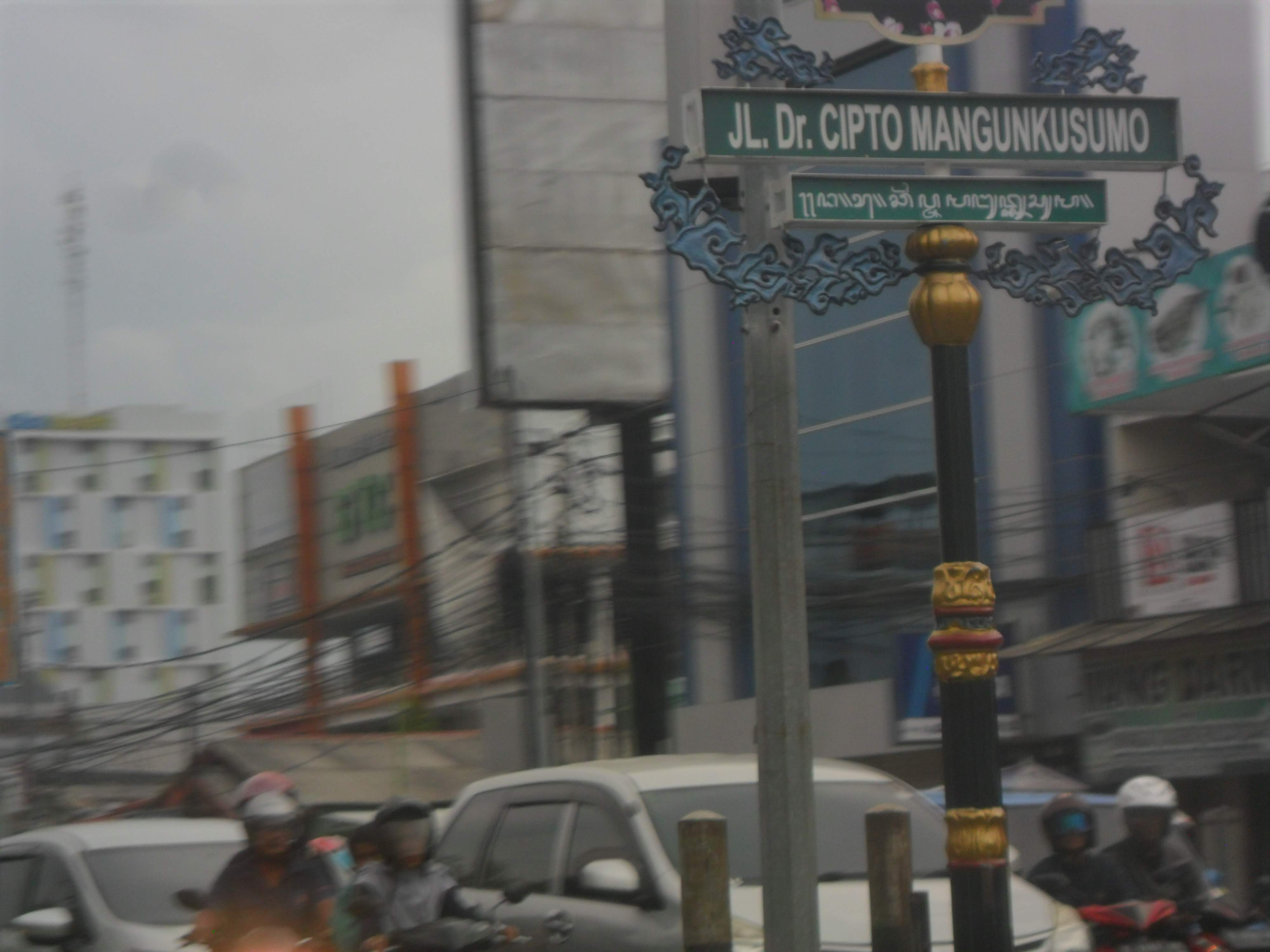 papan nama jalan cipto mangunkusumo cirebon Jawa: ꦥꦥꦤ꧀ ꦢꦭꦤ꧀ ꦕꦶꦥ꧀ꦠ ꦩꦔꦸꦤ꧀ꦏꦸꦱꦸꦩ